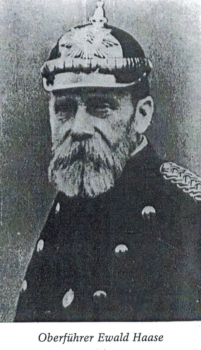 Oberführer Ewald Haase